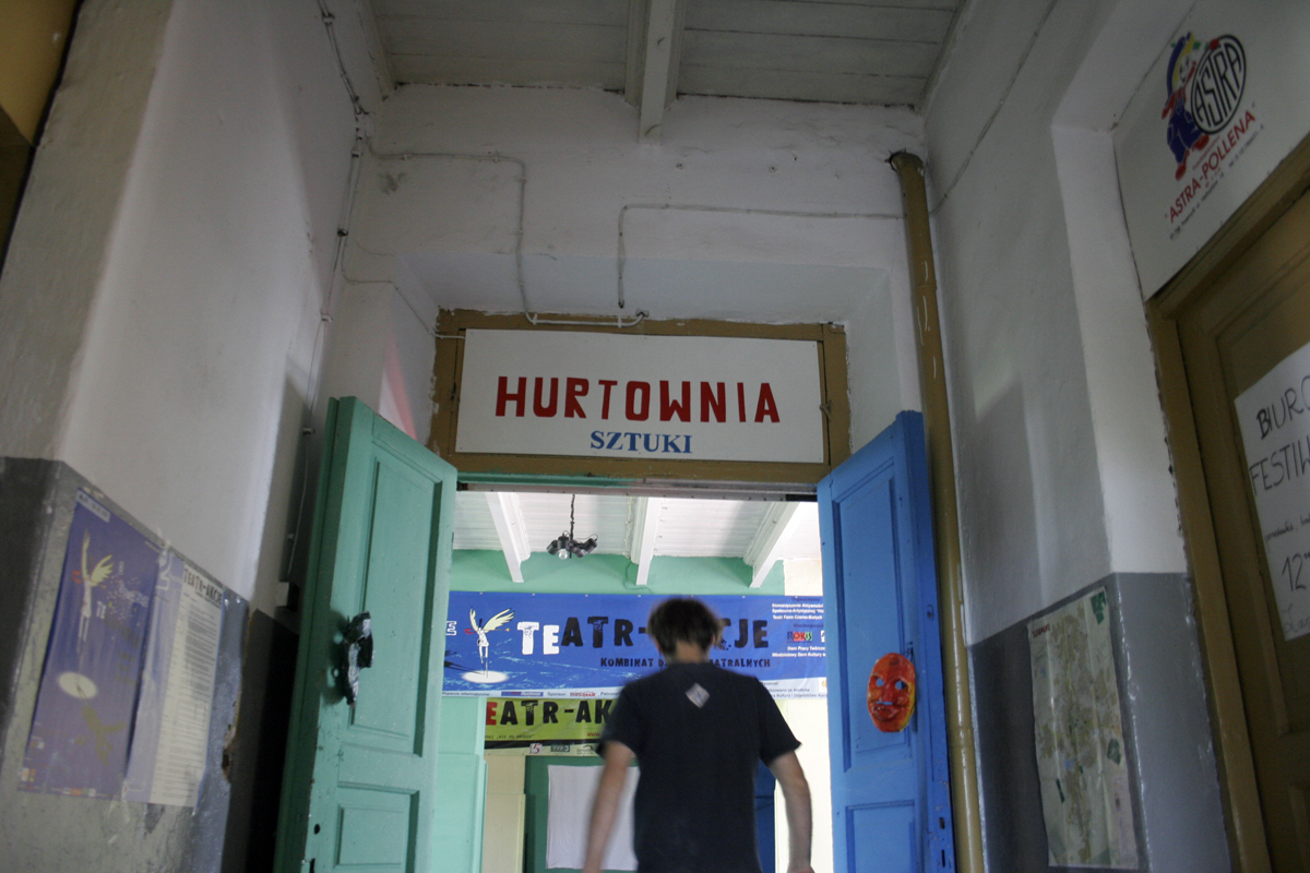 Siedziba Teatr-Akcji przy ulicy Sejneńskiej 18.